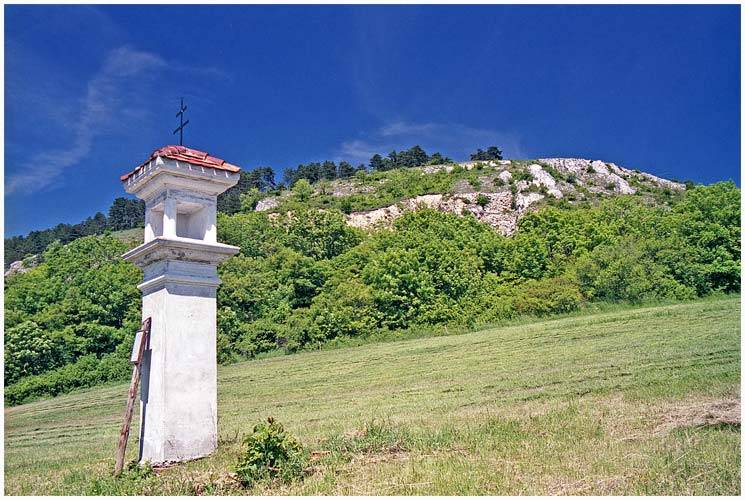 Sloupová boží muka u obce Klentnice pod Pálavskými vrchy